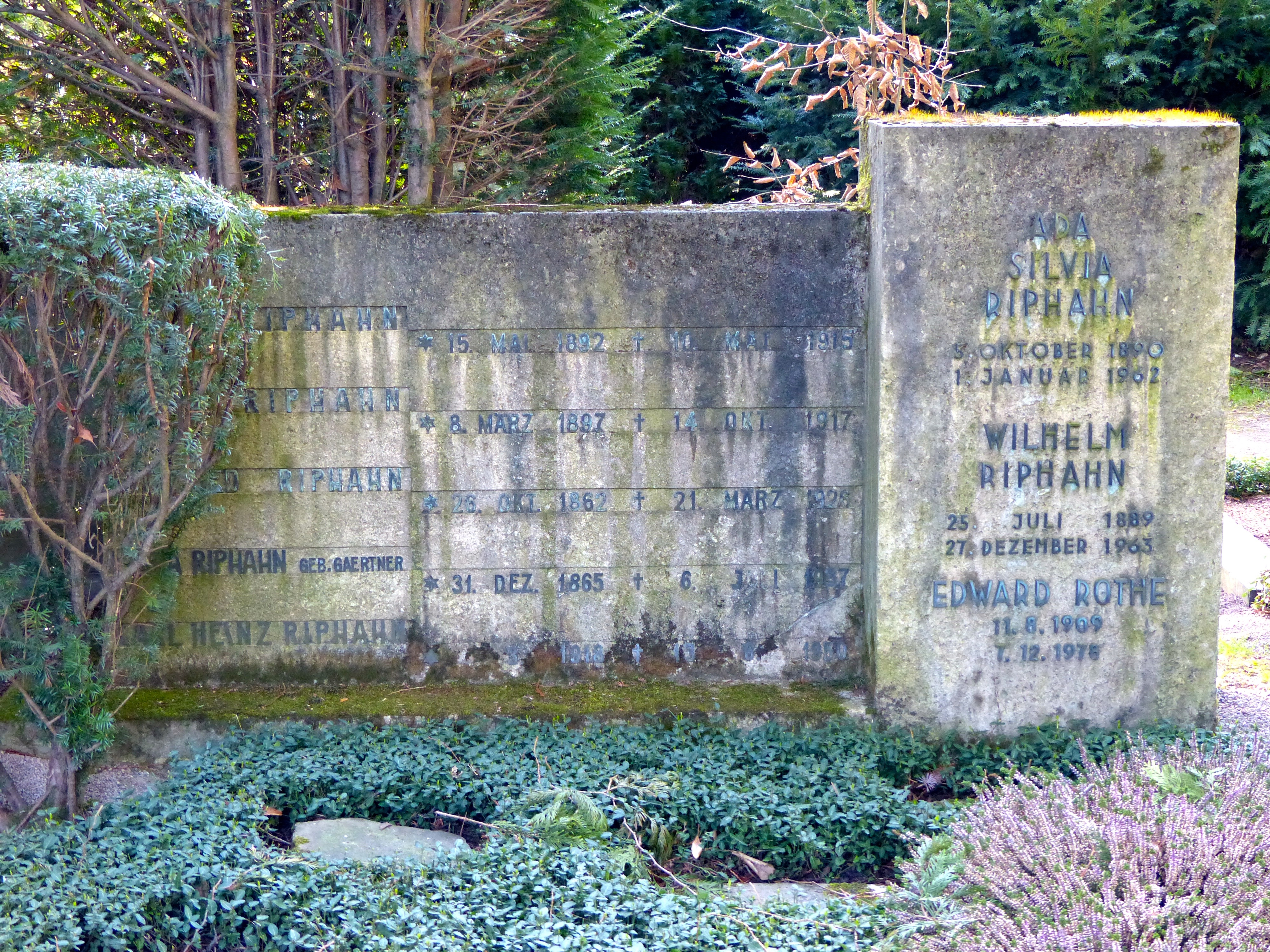 Grabstelle auf dem Melaten-Friedhof: Wilhelm Riphahn (auch Riphan) (* 25. Juli 1889 in Köln; † 27. Dezember 1963 ebenda) war ein deutscher Architekt.